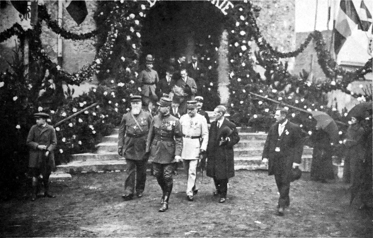 l'inauguration du monument aux morts de la Grande guerre sur une vue ancienne.